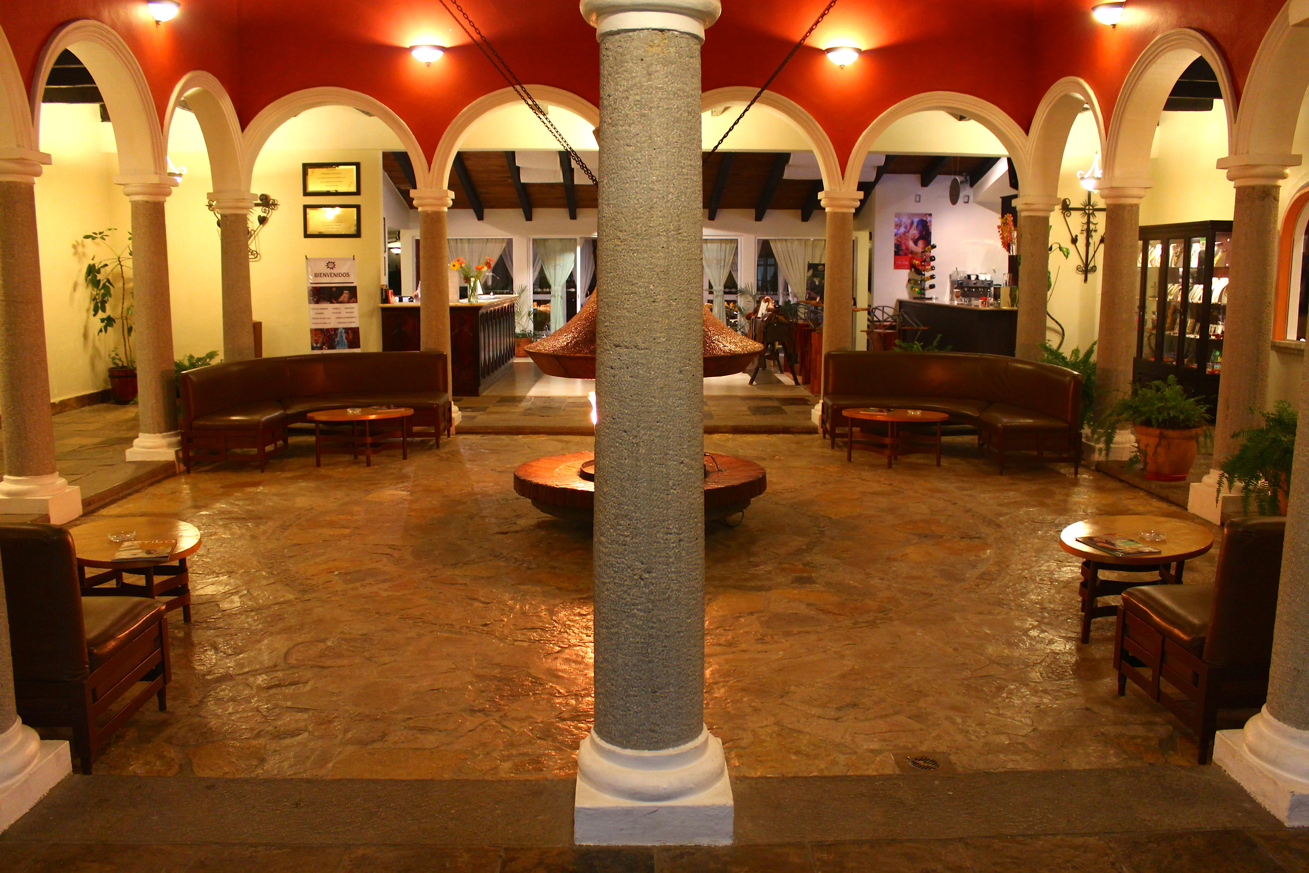 Folklore de la vida cotidiana de San Cristobal de las Casas, Chiapas.